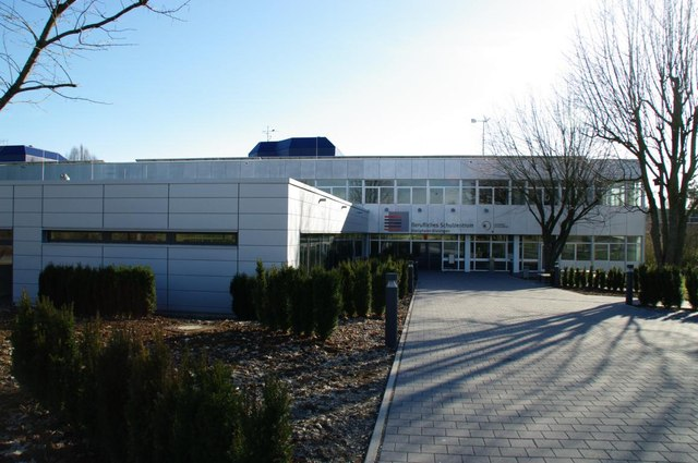 Berufliches Schulzentrum - Bietigheim-Bissingen